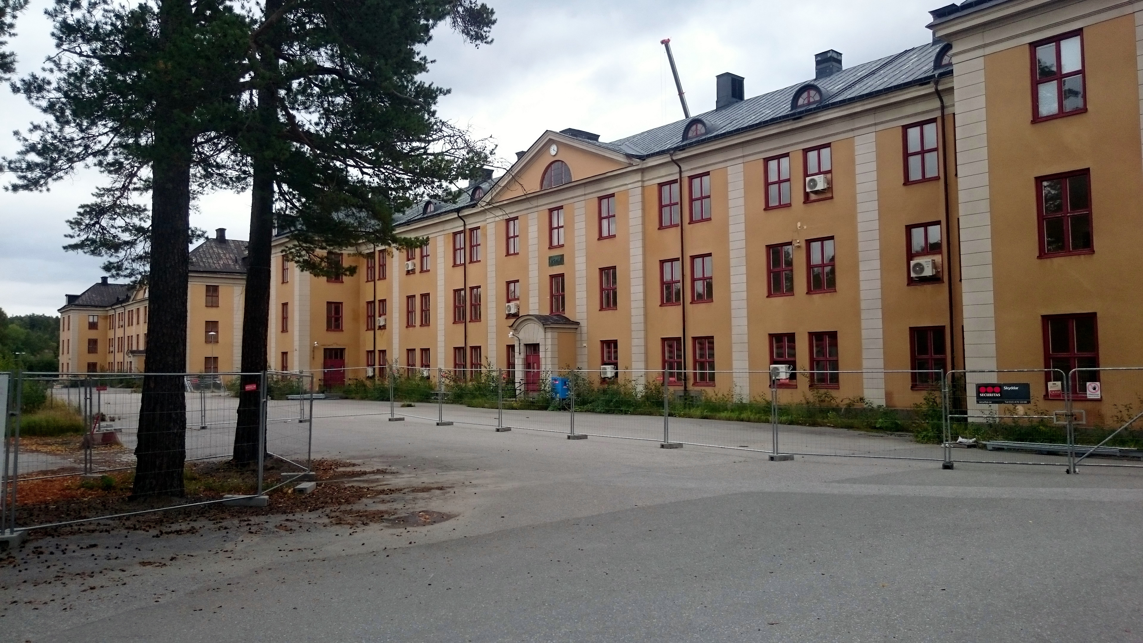 Före detta kasern vid Vaxholms kustartilleriregemente (1906–2000), Vaxholms amfibieregemente (2000–2005) på Rindö.